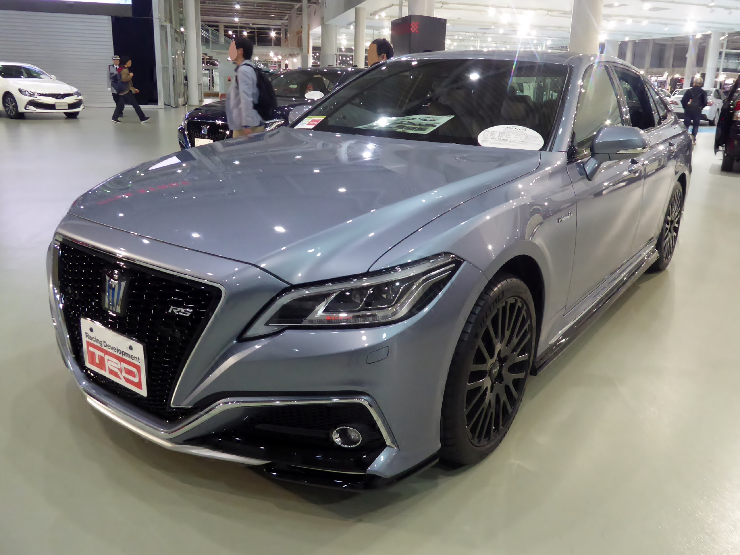 TRD Exterior Parts for RS Body装着の6AA-AZSH21-AEXAB型トヨタ・クラウン2.5HYBRID RS Advance Fourをフロントから撮影。